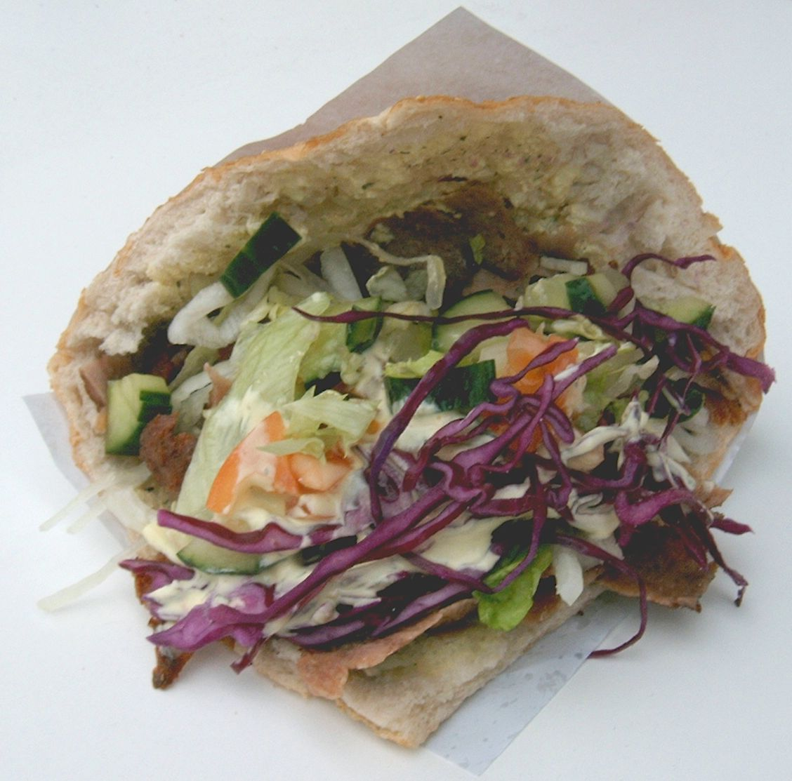 Another Döner kebab sandwich